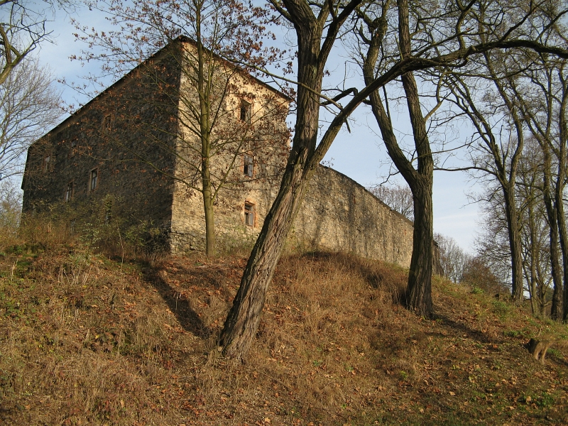 Tvrz, část stojící a archeologické stopy (Mrač), v S části obce 80, Mrač